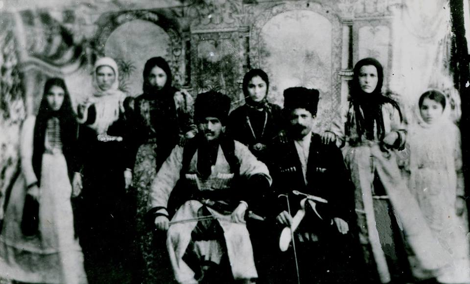 Карачаевцы Алиевы в начале XX в.